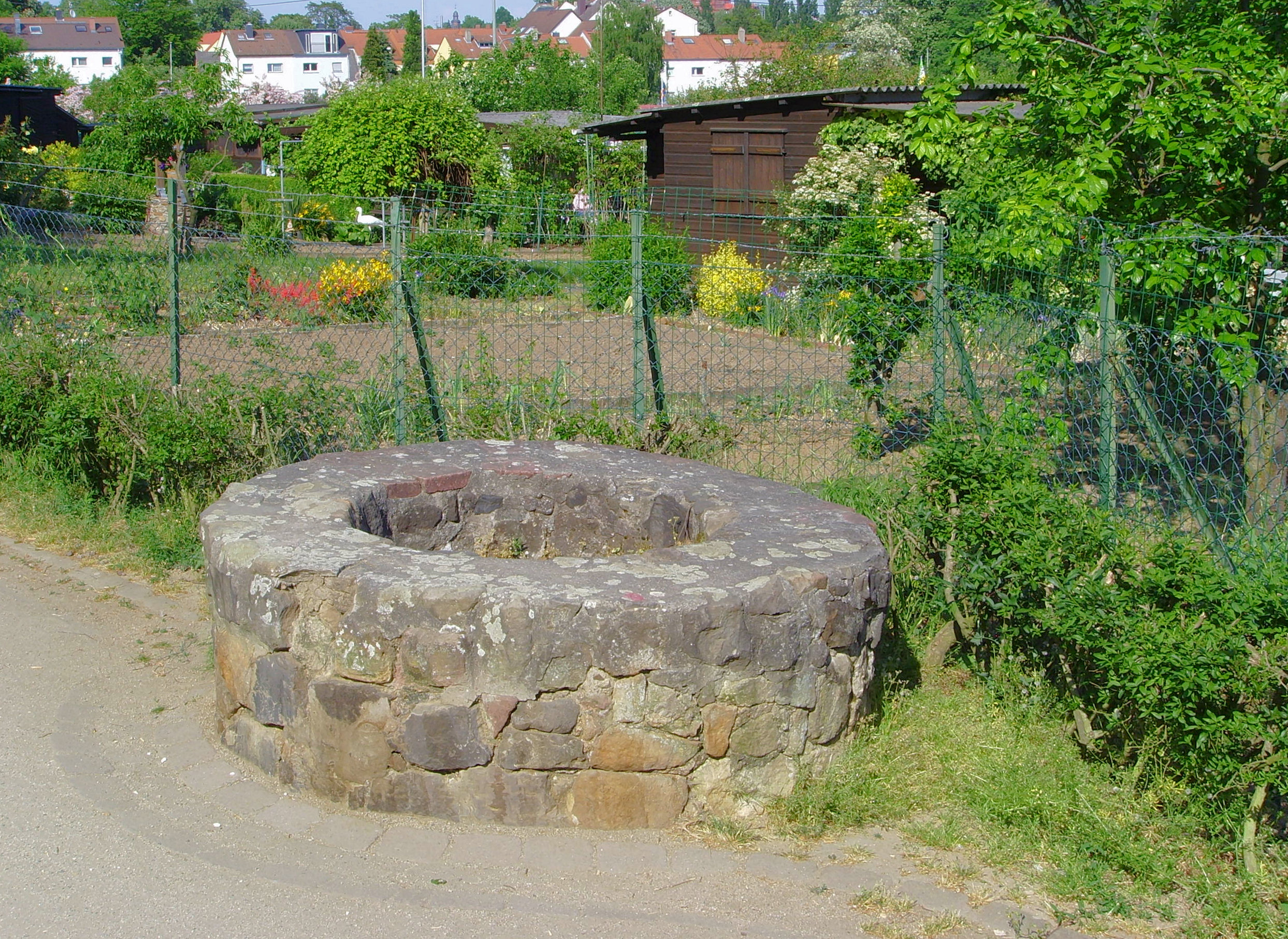 römischer Brunnen, gelegen unterhalb der modernen "Bastionen" der Straße An der Ringmauer in Frankfurt-Heddernheim / Well from the ancient Roman city "Nida" (today: Frankfurt am Main-Heddernheim)